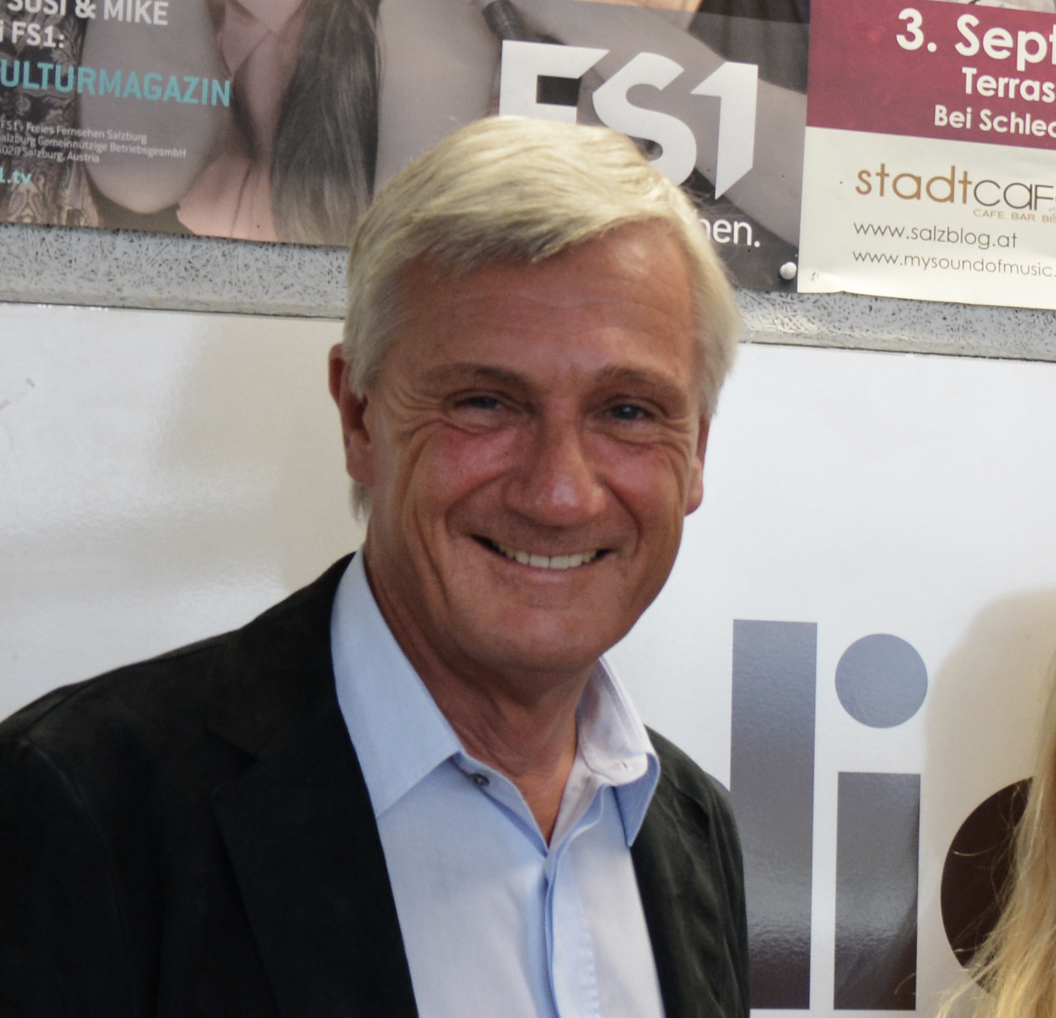 Harald Preuner beim Radiosender "Radiofabrik 107,5" am 22. August 2017